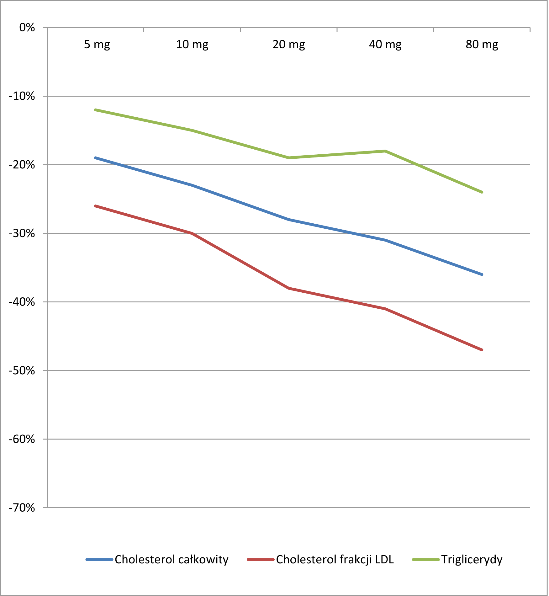 Wpływ simwastatyny na wskaźniki lipidowe (dane do wykresu za Maciej Banach, Jacek Rysz, Krzysztof J. Filipiak: Simwastatyna. Gdańsk: Via Medica, 2009. ISBN 978-83-7599-118-5. strona 17)